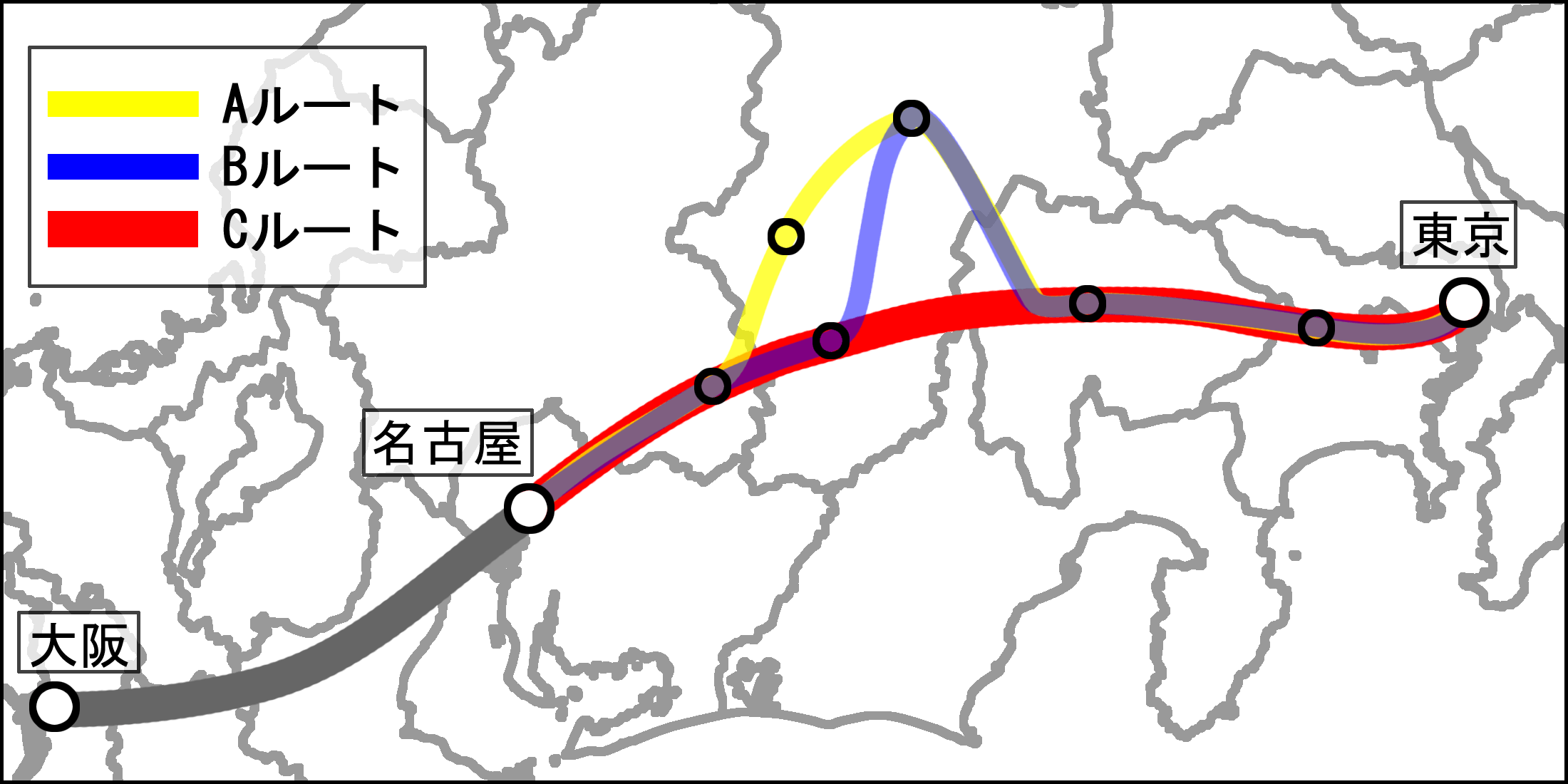 中央リニア新幹線の想定ルート。Aルート：木曽谷ルート(東京-相模原-甲府-諏訪-木曽福島-中津川-名古屋)Bルート：伊那谷ルート(東京-相模原-甲府-諏訪-飯田-中津川-名古屋)Cルート：南アルプスルート(東京-相模原-甲府-飯田-中津川-名古屋)。